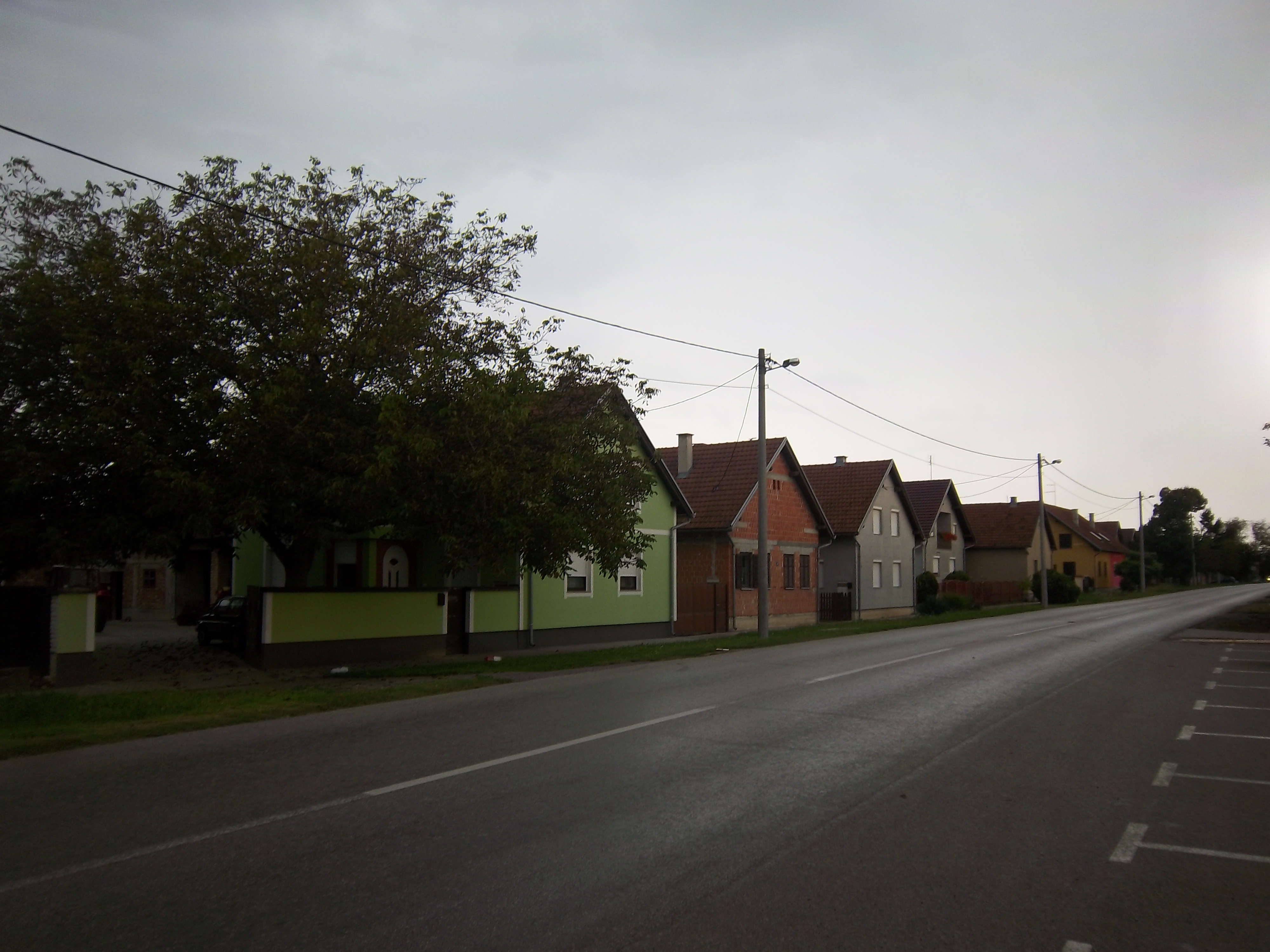 Српски (ћирилица): Насеље Церић у источној Хрватској.